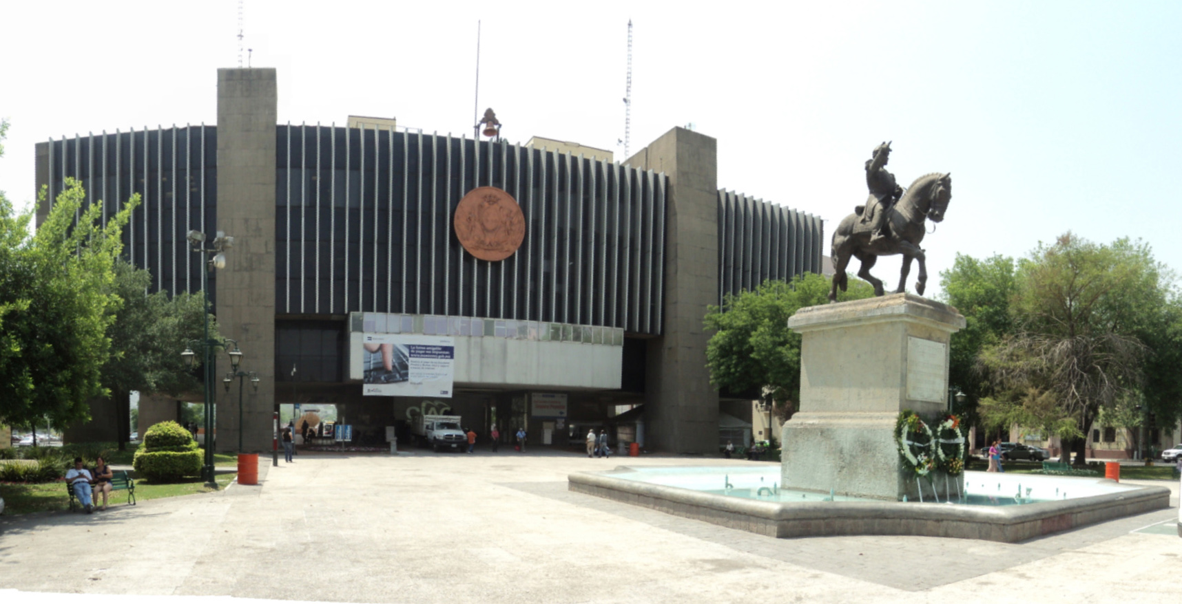 Palacio municipal Monterrey.